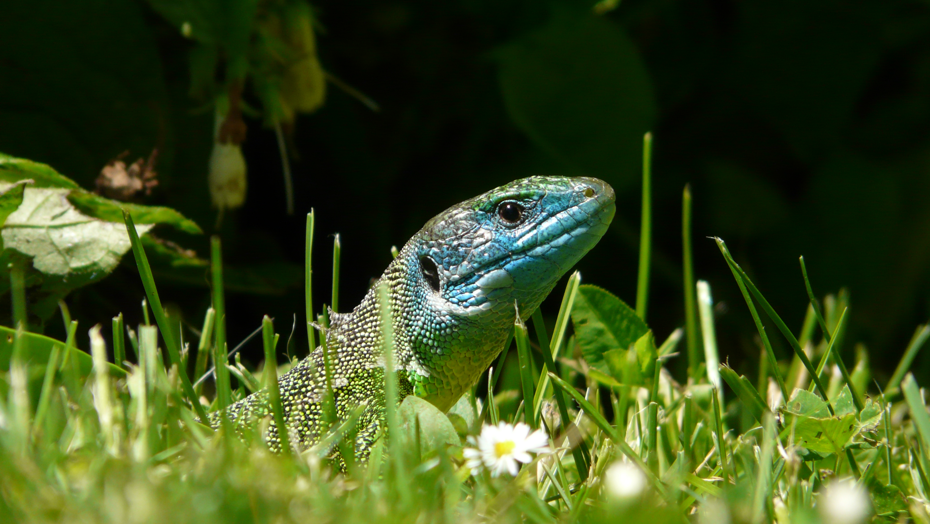 Lézard vert mâle